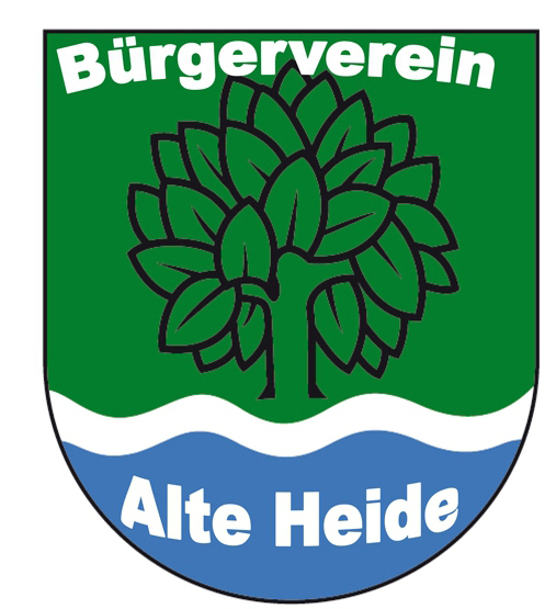 Logo Bürgerverein Alte Heide